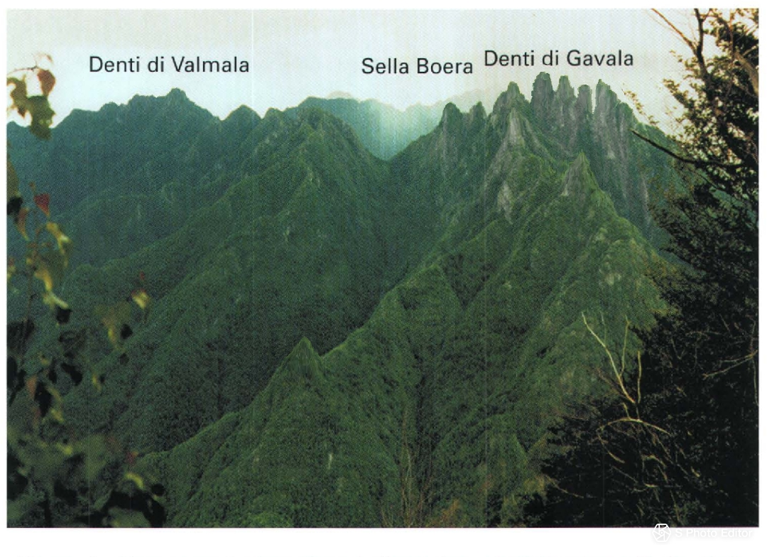 Guglie rocciose alte meno di 2000 m in un ambiente selvaggio, Valsesia.